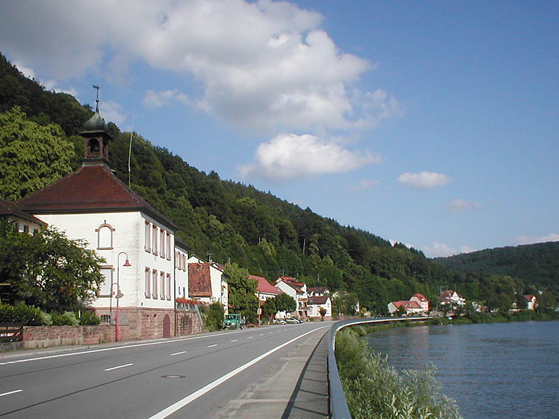 Ortsmitte von Zwingenberg (Baden), im Vordergrund rechts das Rathaus